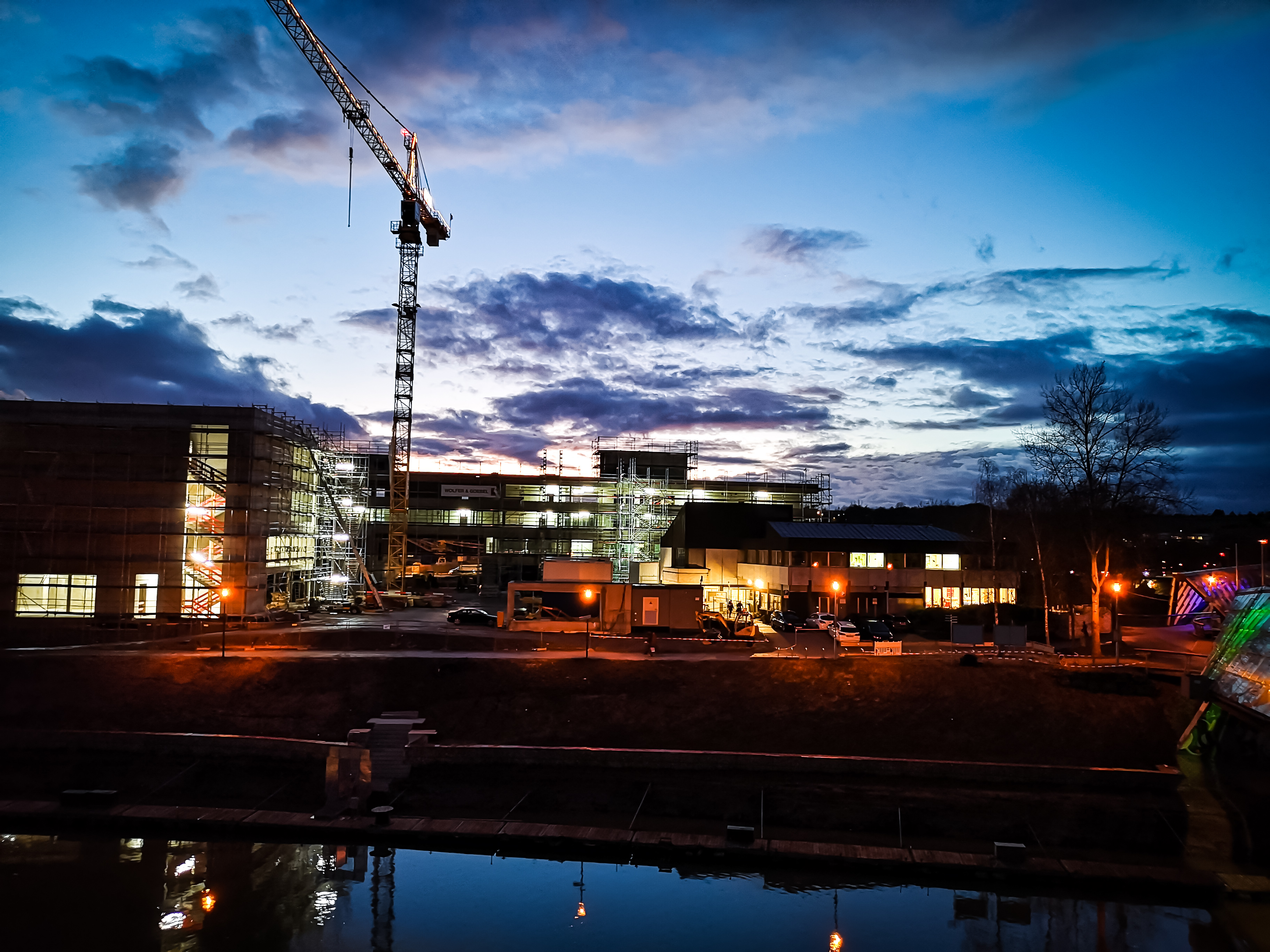 Remsecker Rathaus im Neubau am Abend. Stand Jan 2019.